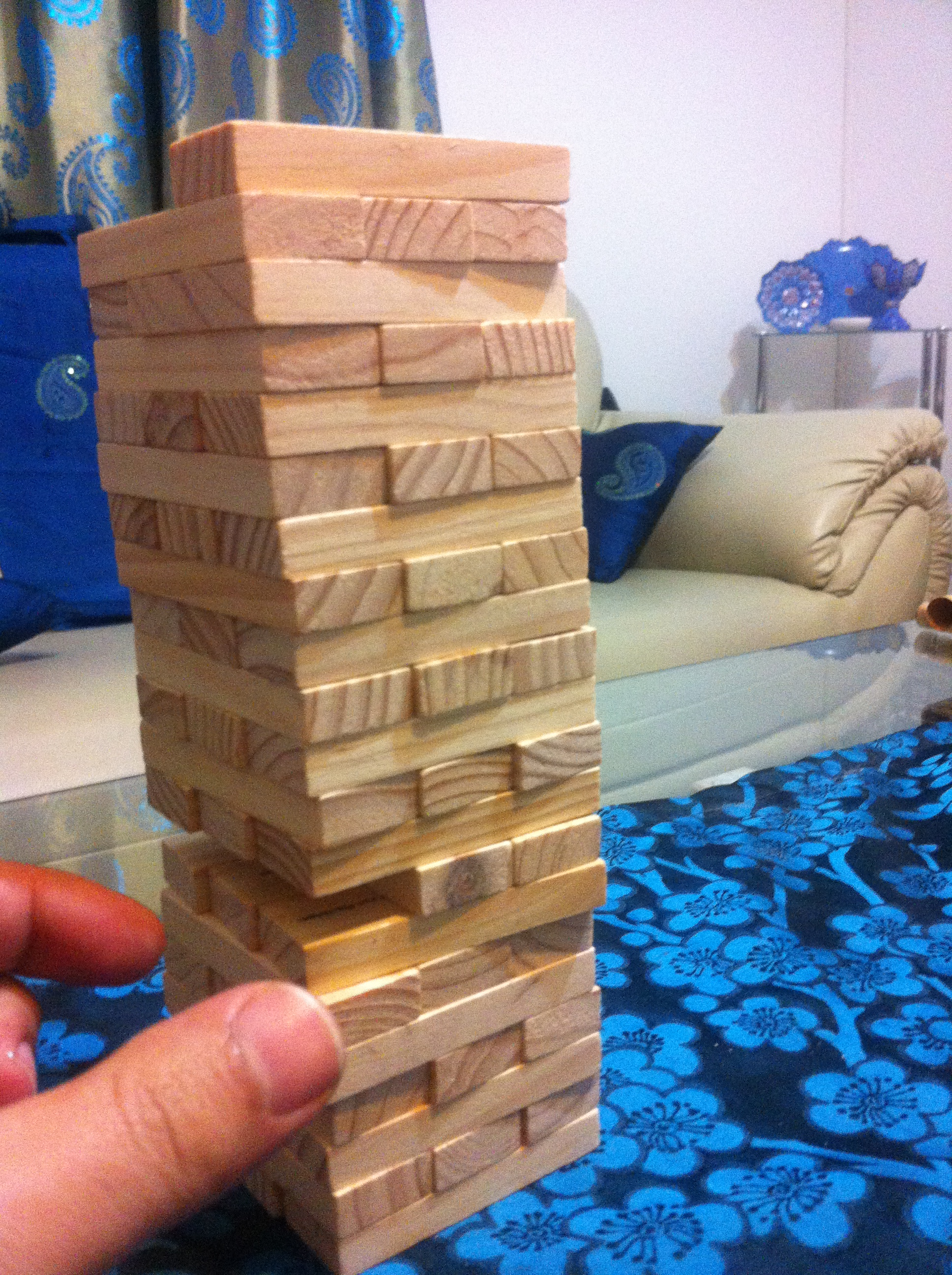 یک نمونه از ست بلوک های چیده شده جنگا